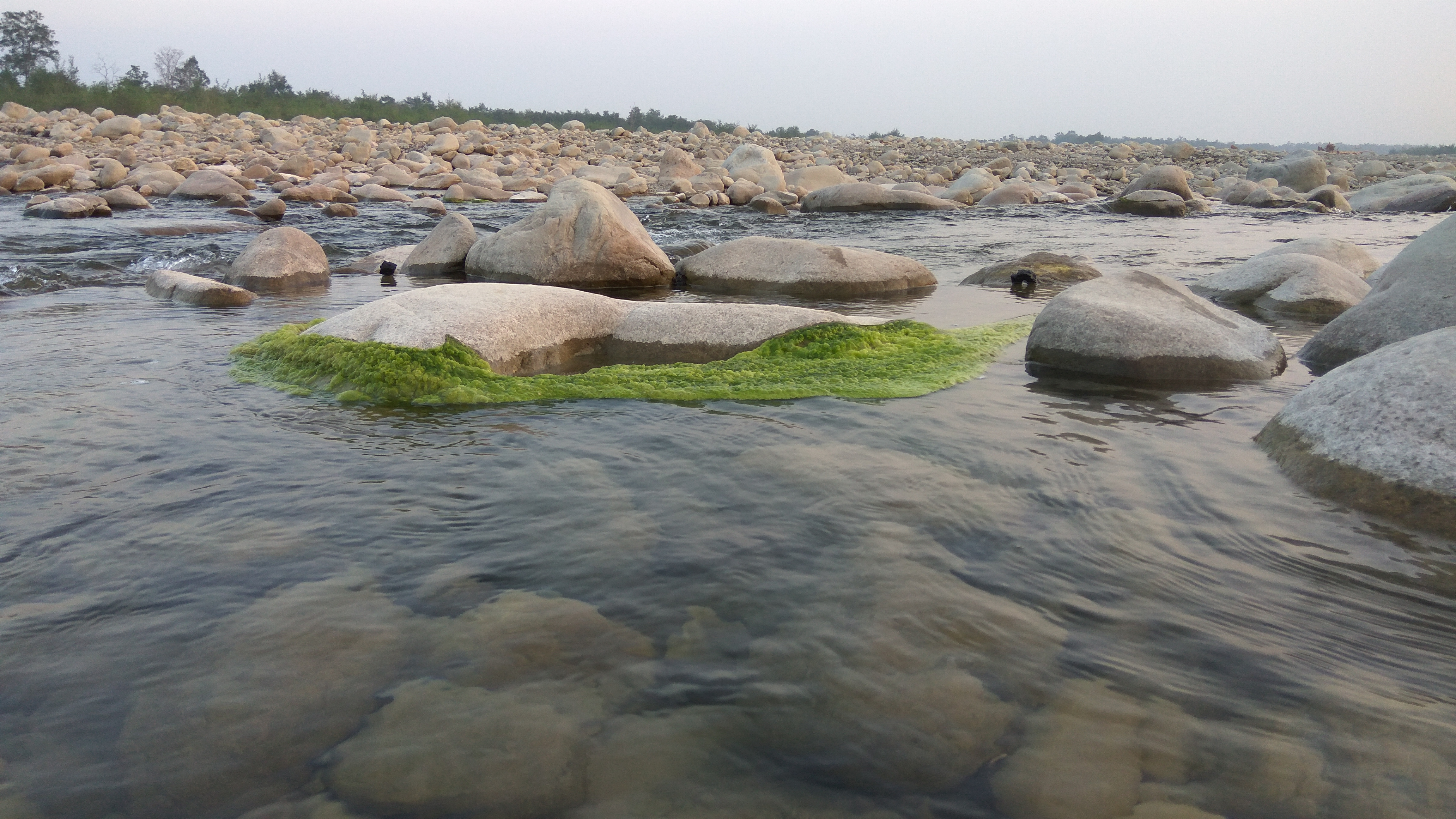 नन्धौर नदी का दृश्य